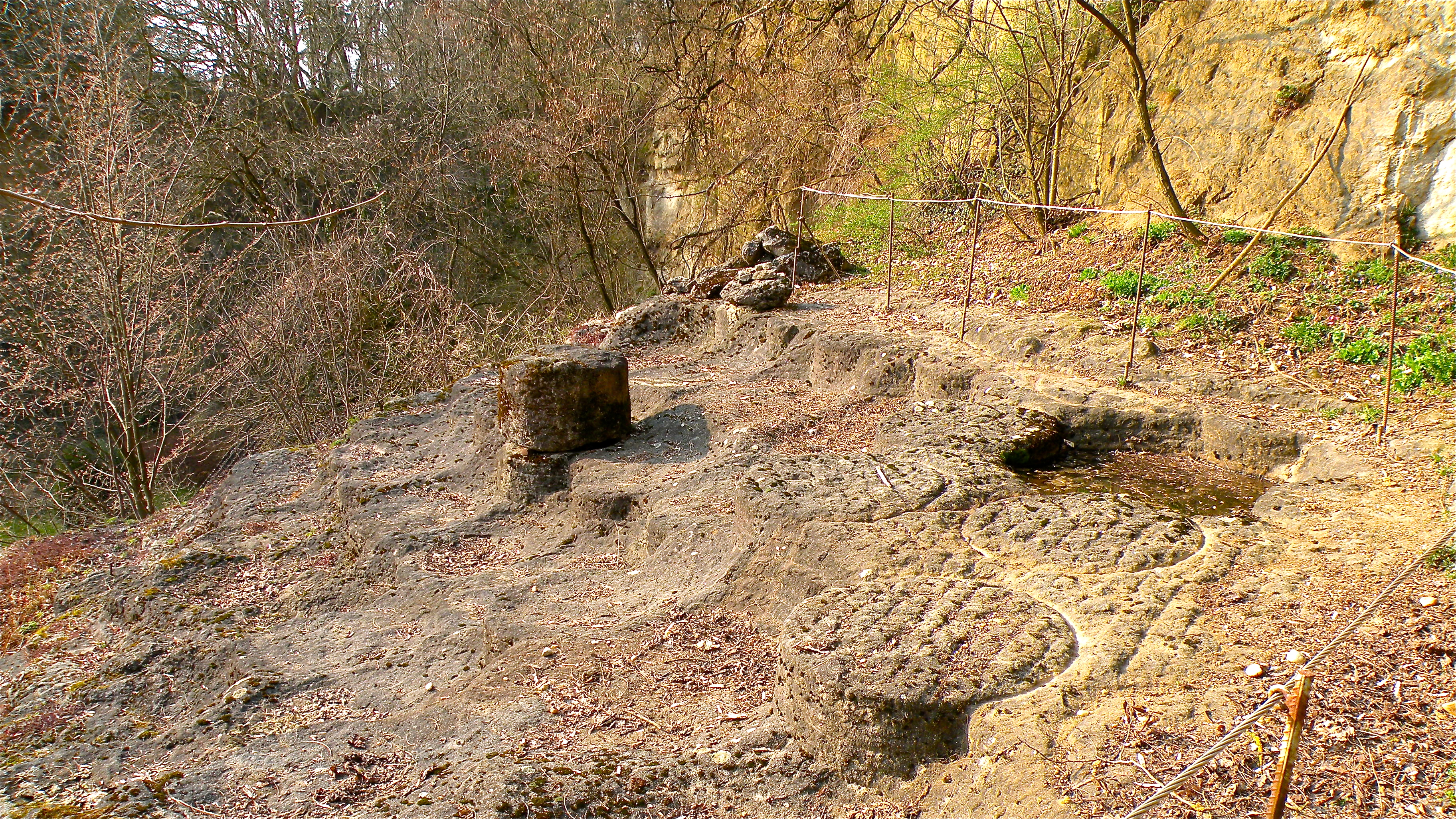 Mühlsteinbruch Scherer in Perg Überblick